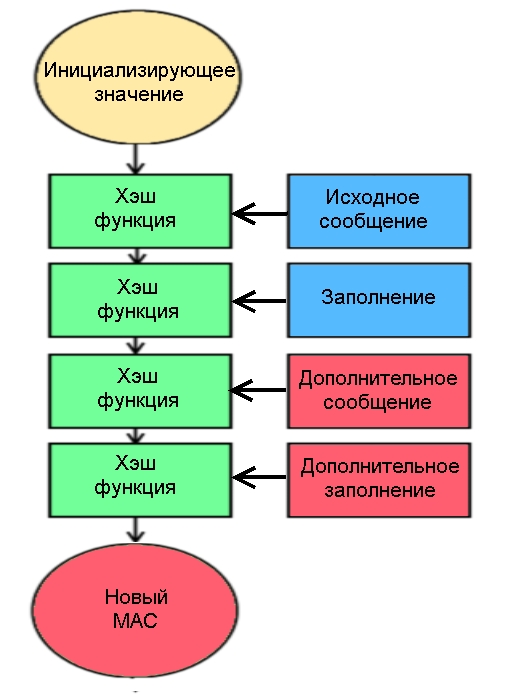 Схема криптографической атаки удлинением сообщения